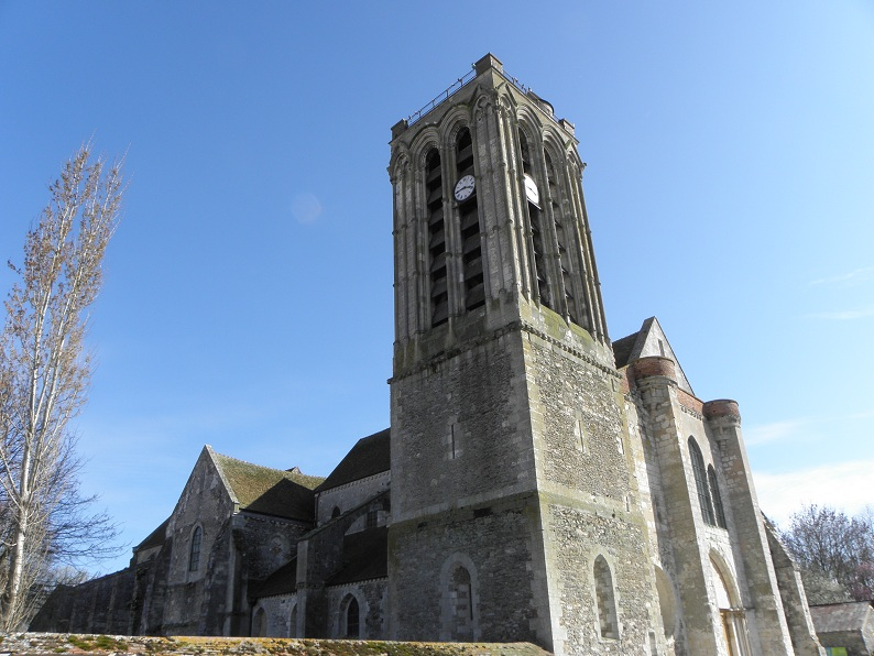 Façade septentrionale de la collégiale Saint-Martin de Champeaux (77).